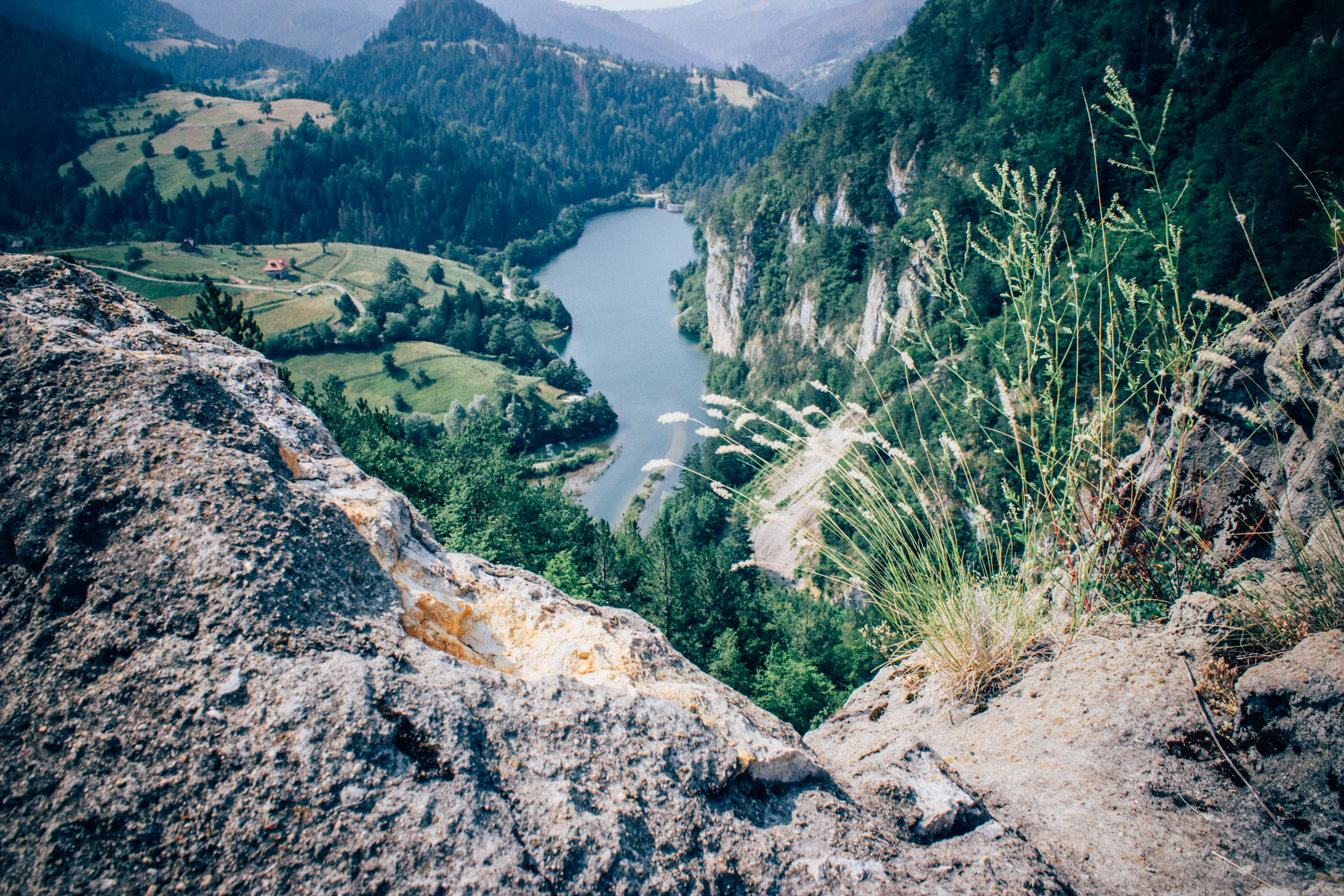 Ово је фотографија заштићеног природног добра у Србији под шифром: ПИО13 This is a a photo of a natural area in Serbia with ID: ПИО13 Spajići, Beli Rzav